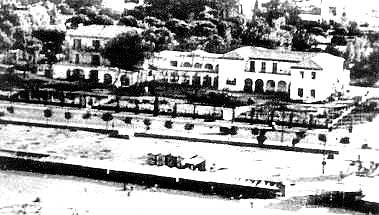 Veduta aerea della villa del Duce Benito Mussolini a Riccione nel 1935.